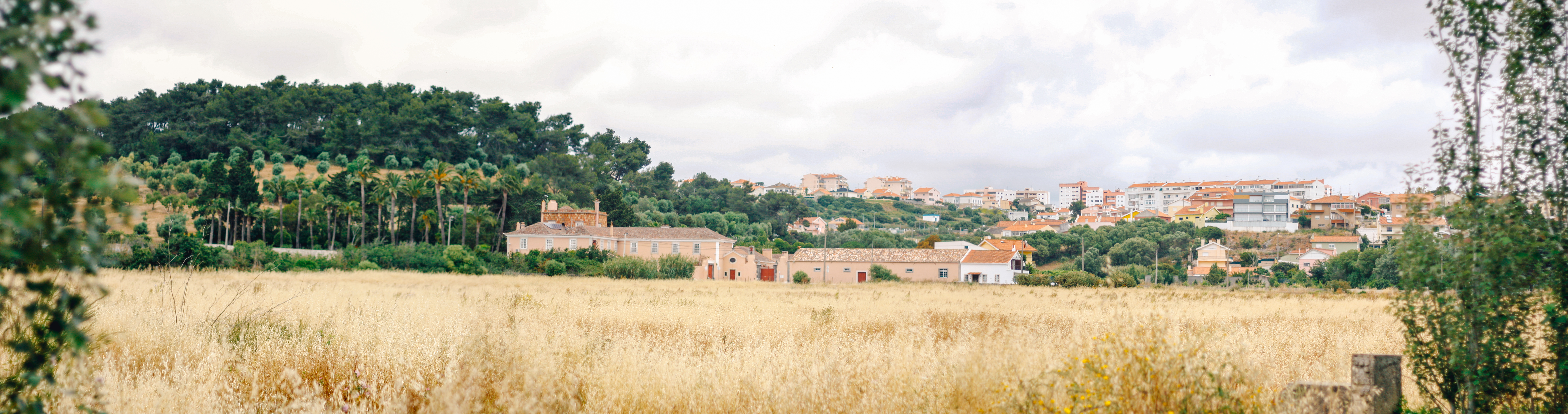 Situação da Quinta dos Chainhos, em São Domingos de Rana.